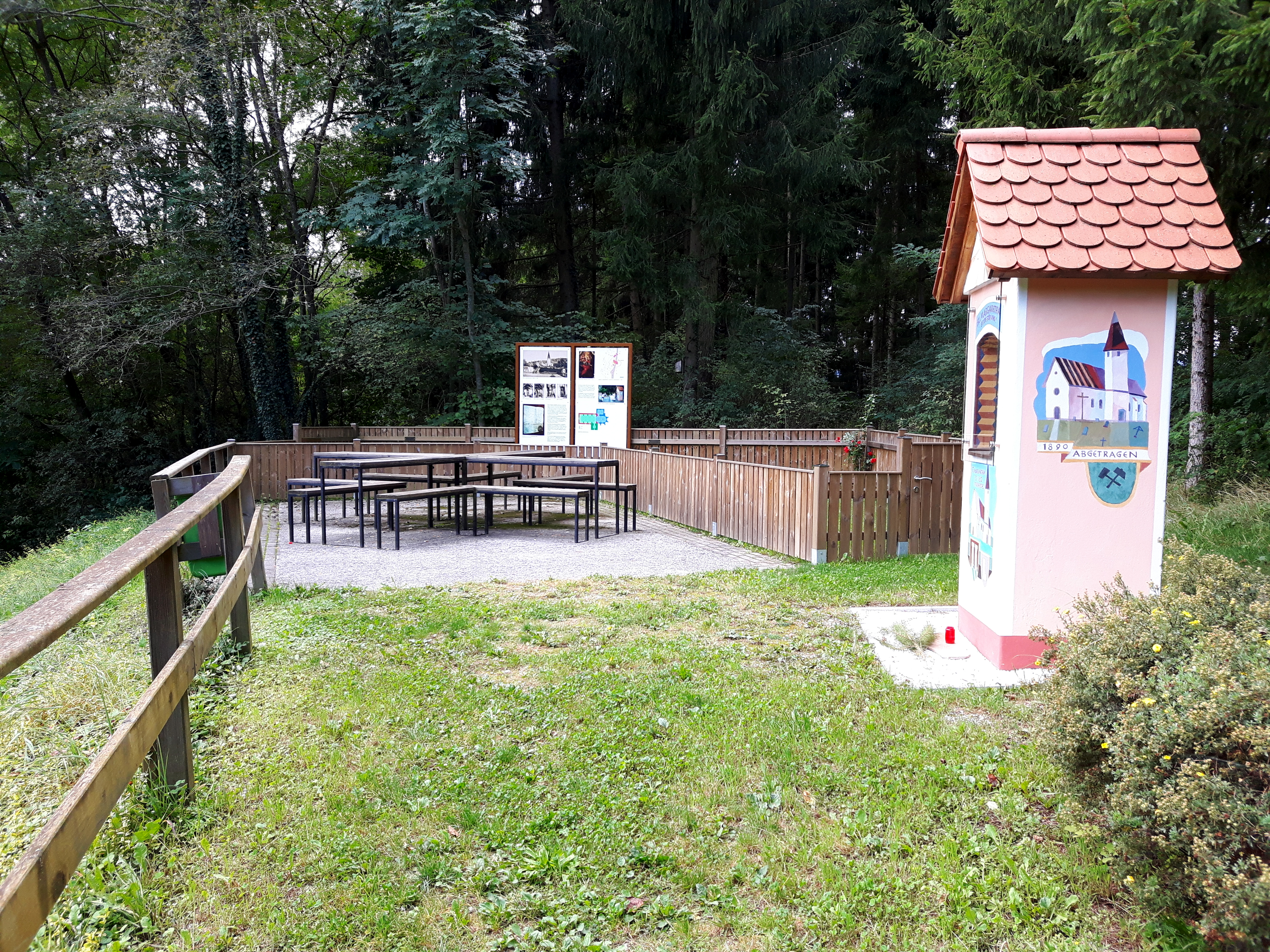 Die Erinnerungsstätte Margarethenkirche in Voitsberg, Steiermark